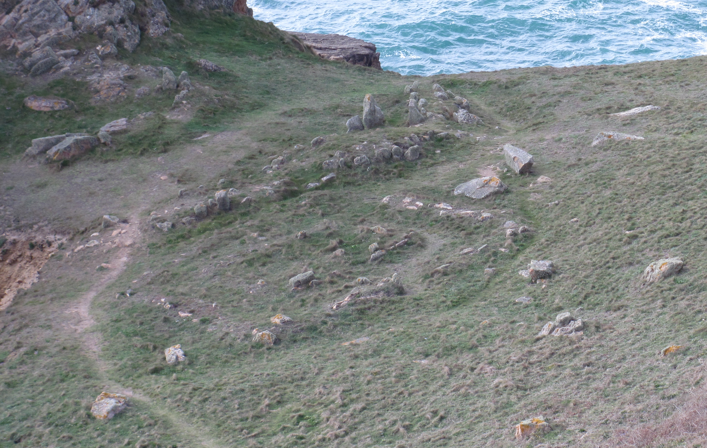 Nrf: Lé Pinnacl'ye, Jèrri